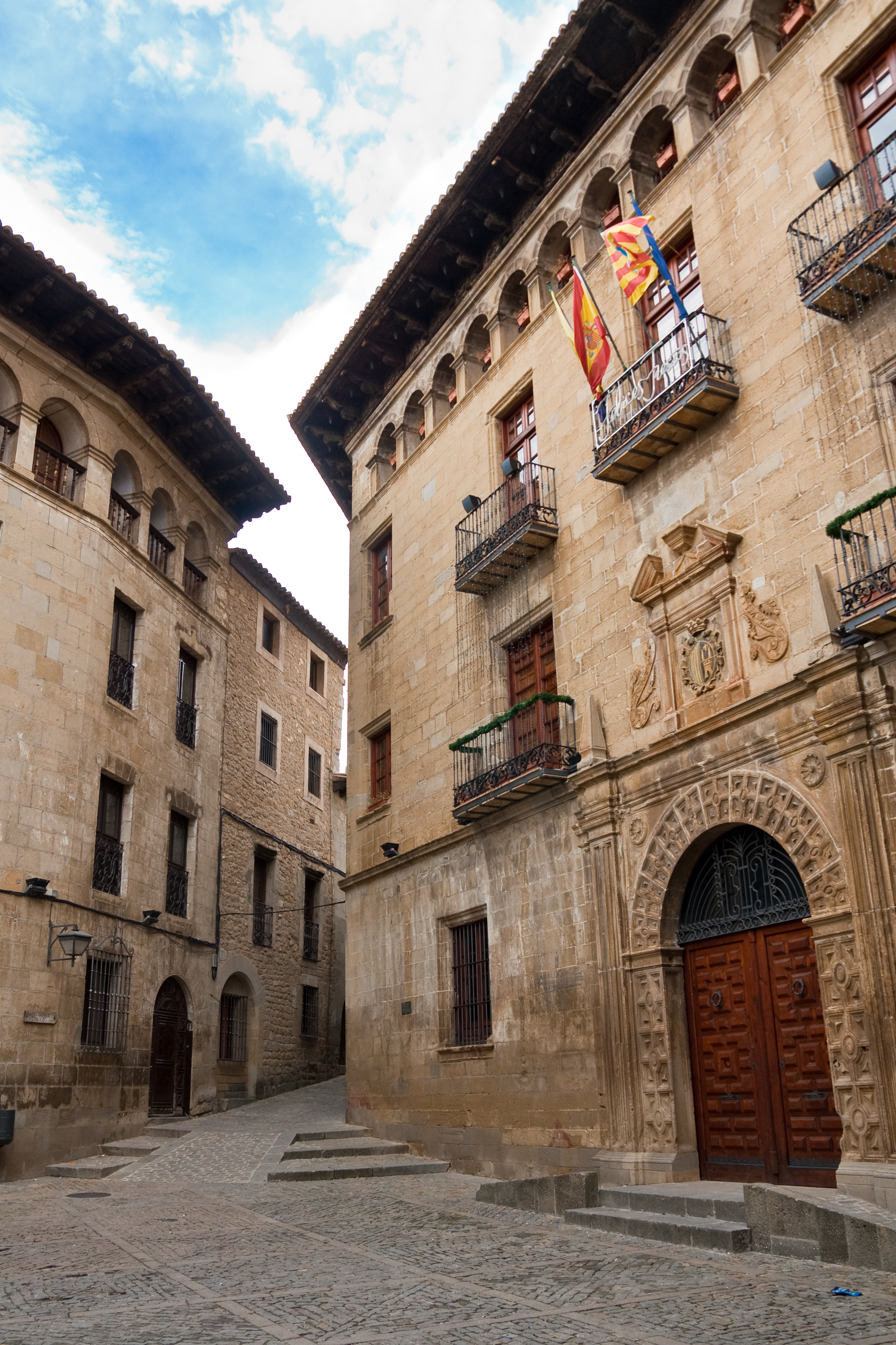 La Villa de Sos del Rey Católico